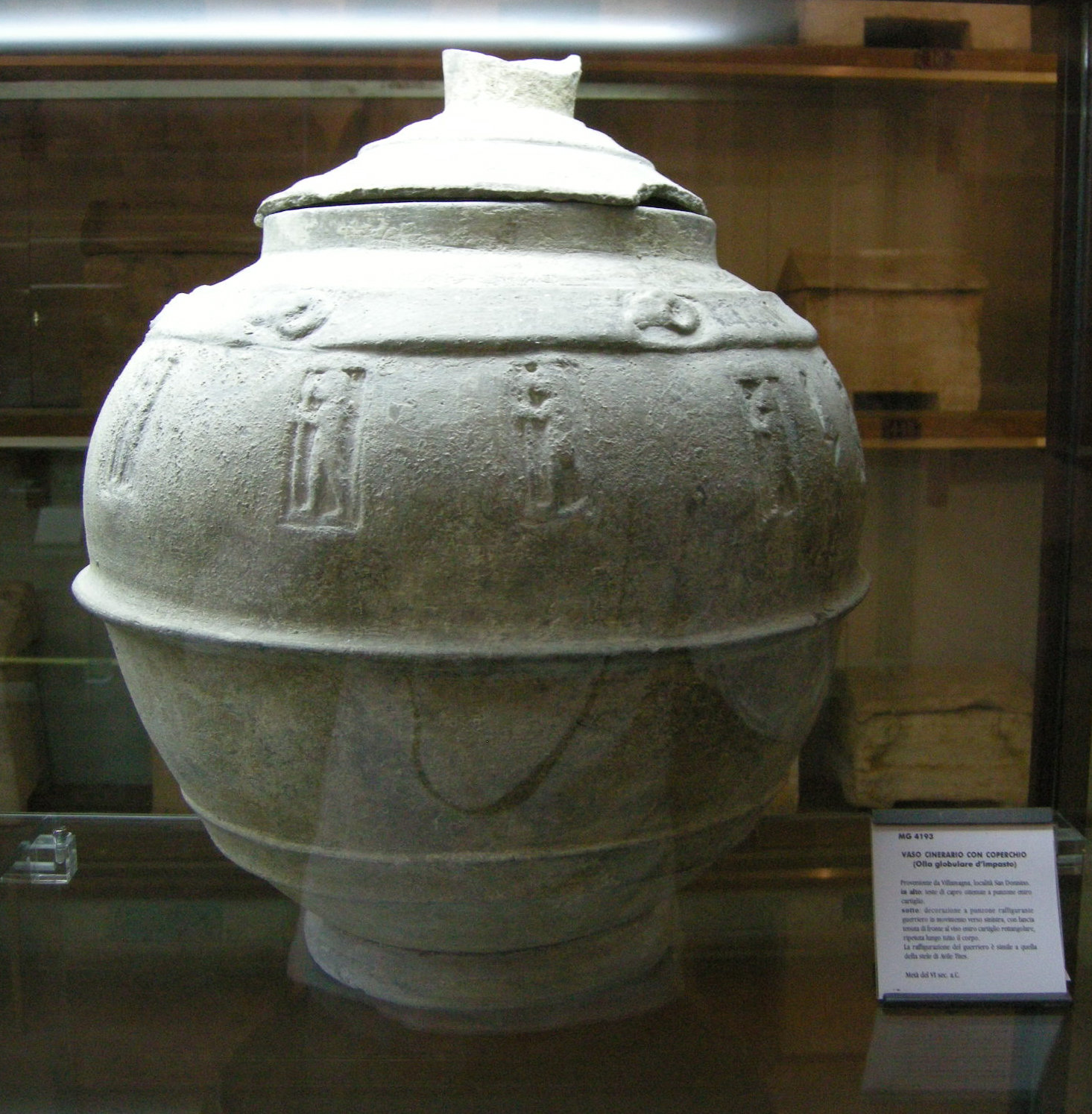 Museo guarnacci, vaso cinerario con coperchio, metà vi sec. ac.